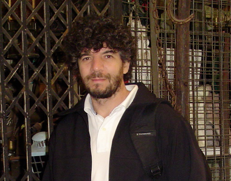 Fotografia de Julio F. Navarro